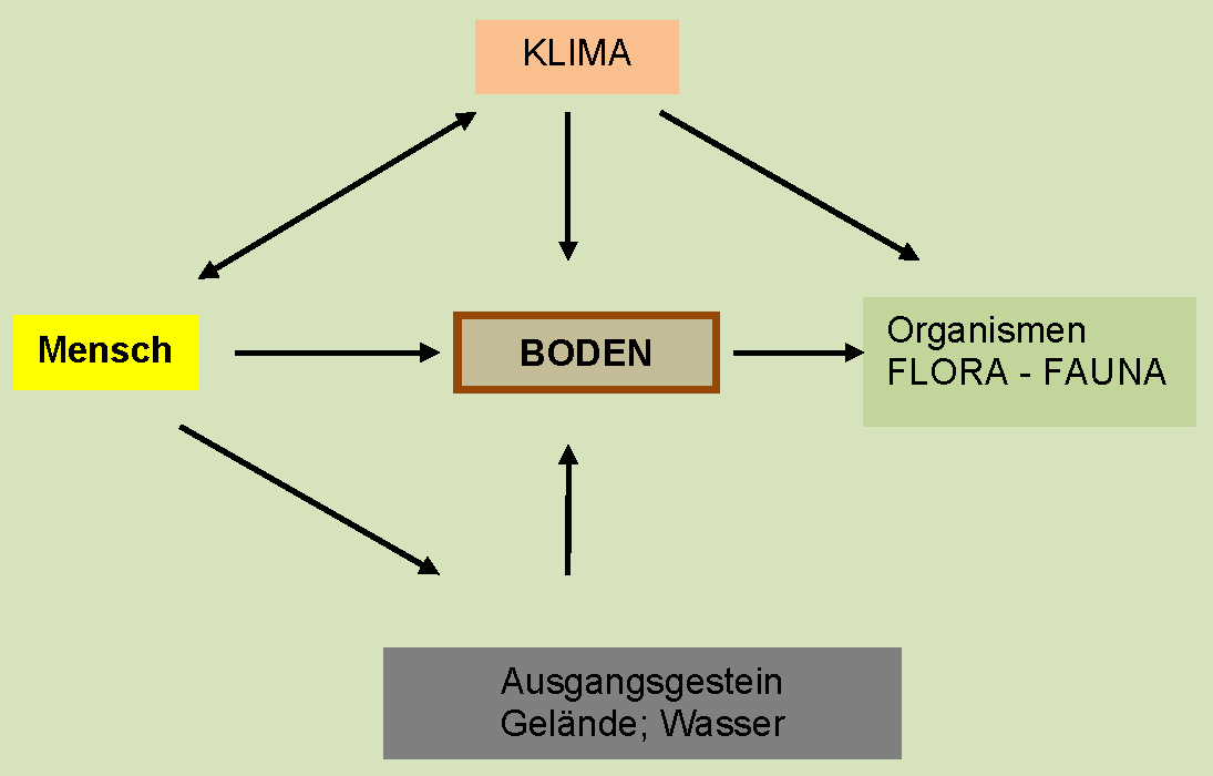 Standortfaktoren Weinbau